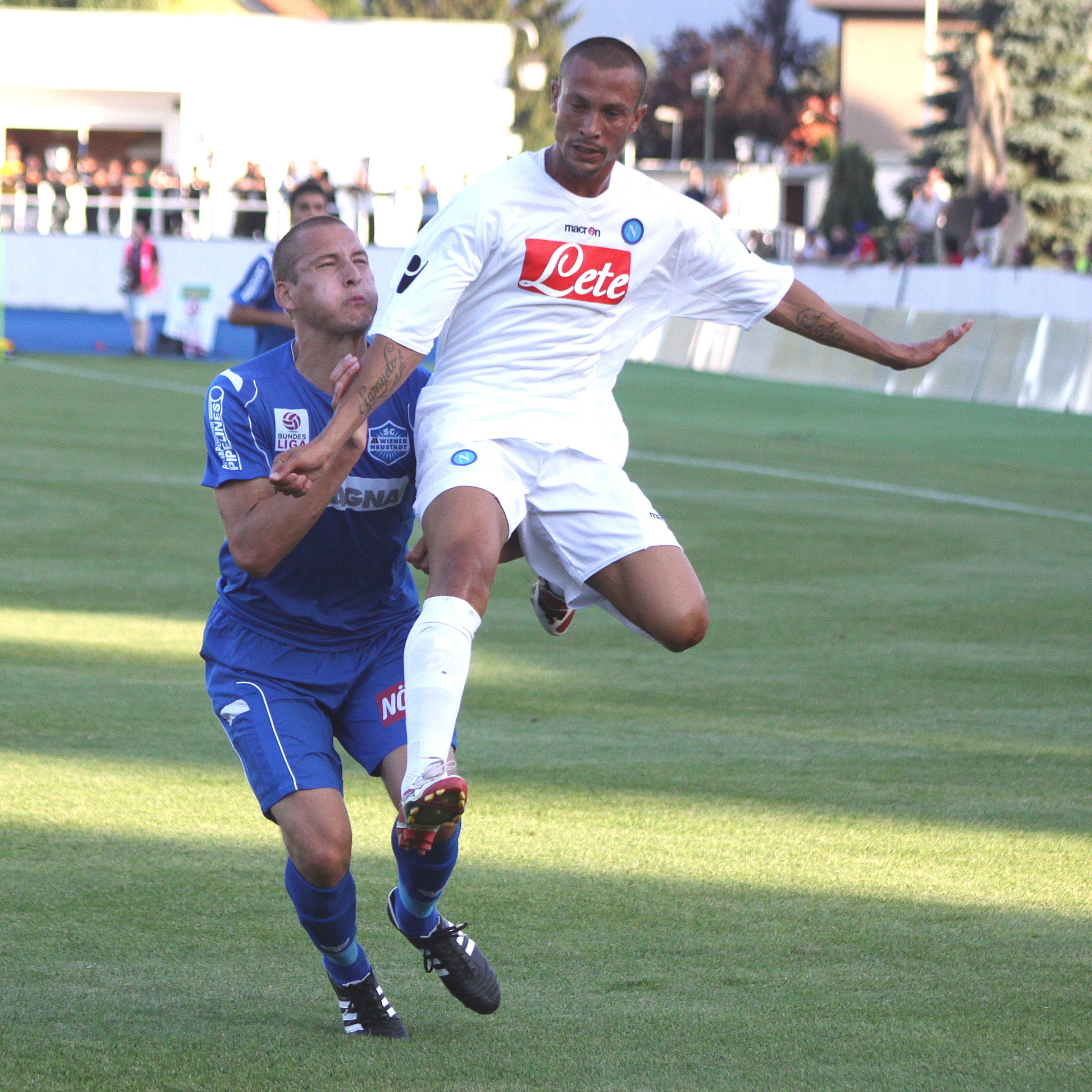 Christian Ramsebner (SC Magna Wiener Neustadt, blauer Dress) und Inácio Piá (SSC Neapel, weißer Dress) Christian Ramsebner (SC Magna Wiener Neustadt, azurro) Inácio Piá (Società Sportiva Calcio Napoli, bianco)